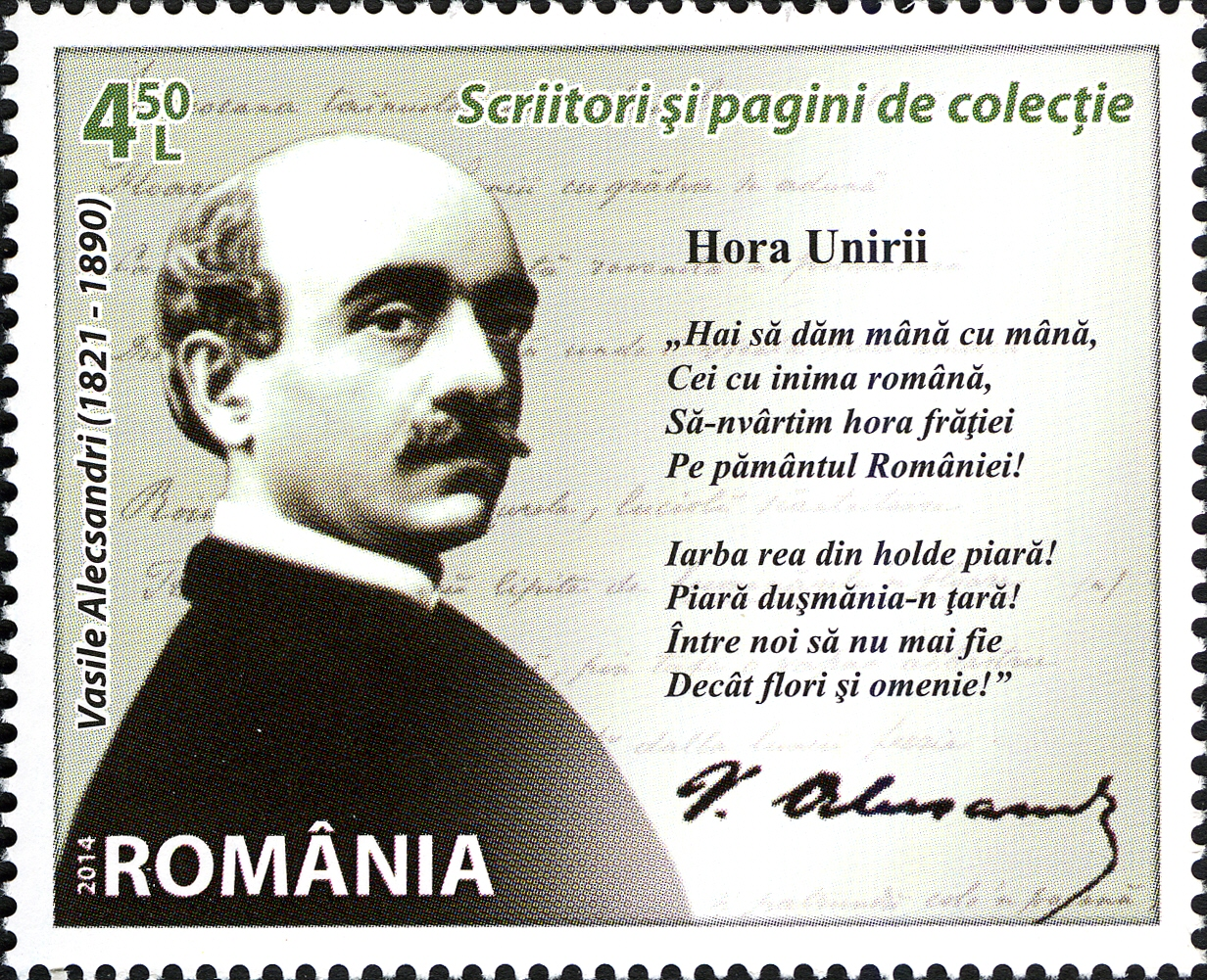 Romanian Writers - Vasile Alecsandri